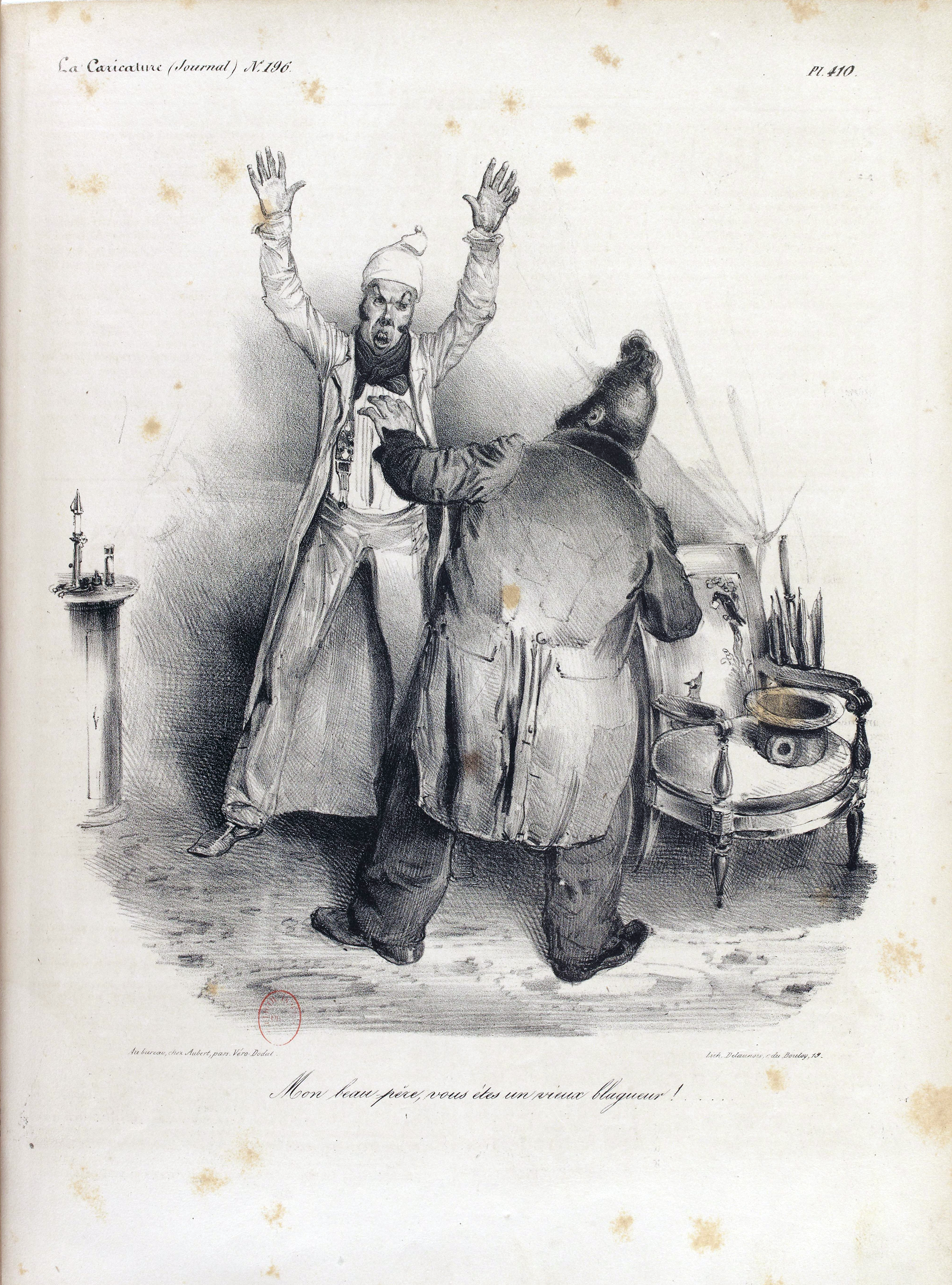 Caricature de Léopold Ier (roi des Belges) et de Louis-Philippe Ier (roi des Français), le premier sortant du lit nuptial dit au second : "Mon beau-père, vous êtes un vieux blagueur !...". Lithographie de Traviès.